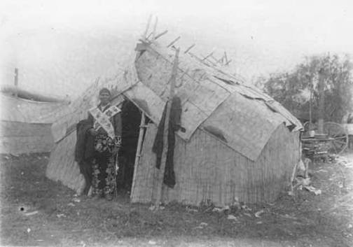 Midewigaan